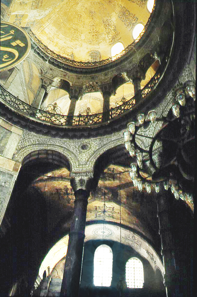 Istanbul - Haghia Sophia - Inside